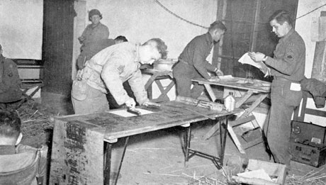 Poste de commandement du 60ème Bataillon de Combat du Génie Américain à Lanfroicourt.